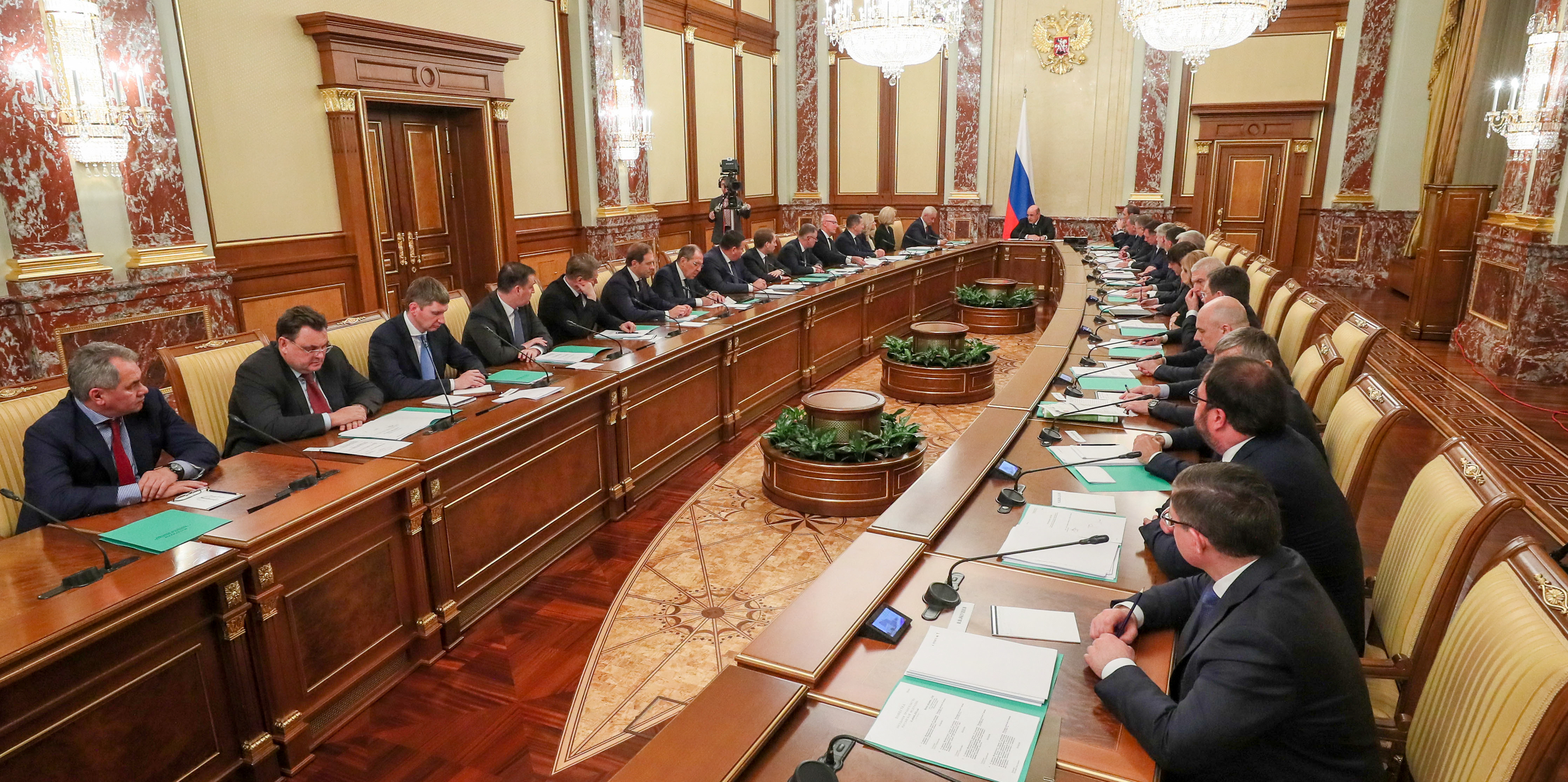 Первое заседание правительства Михаила Мишустина, 21 января 2020